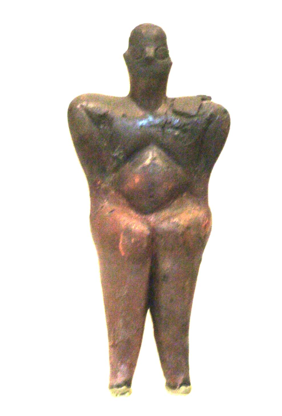 Nőidol, Hacilar (Anatóliai Civilizációk Múzeuma, Ankara, Törökország)